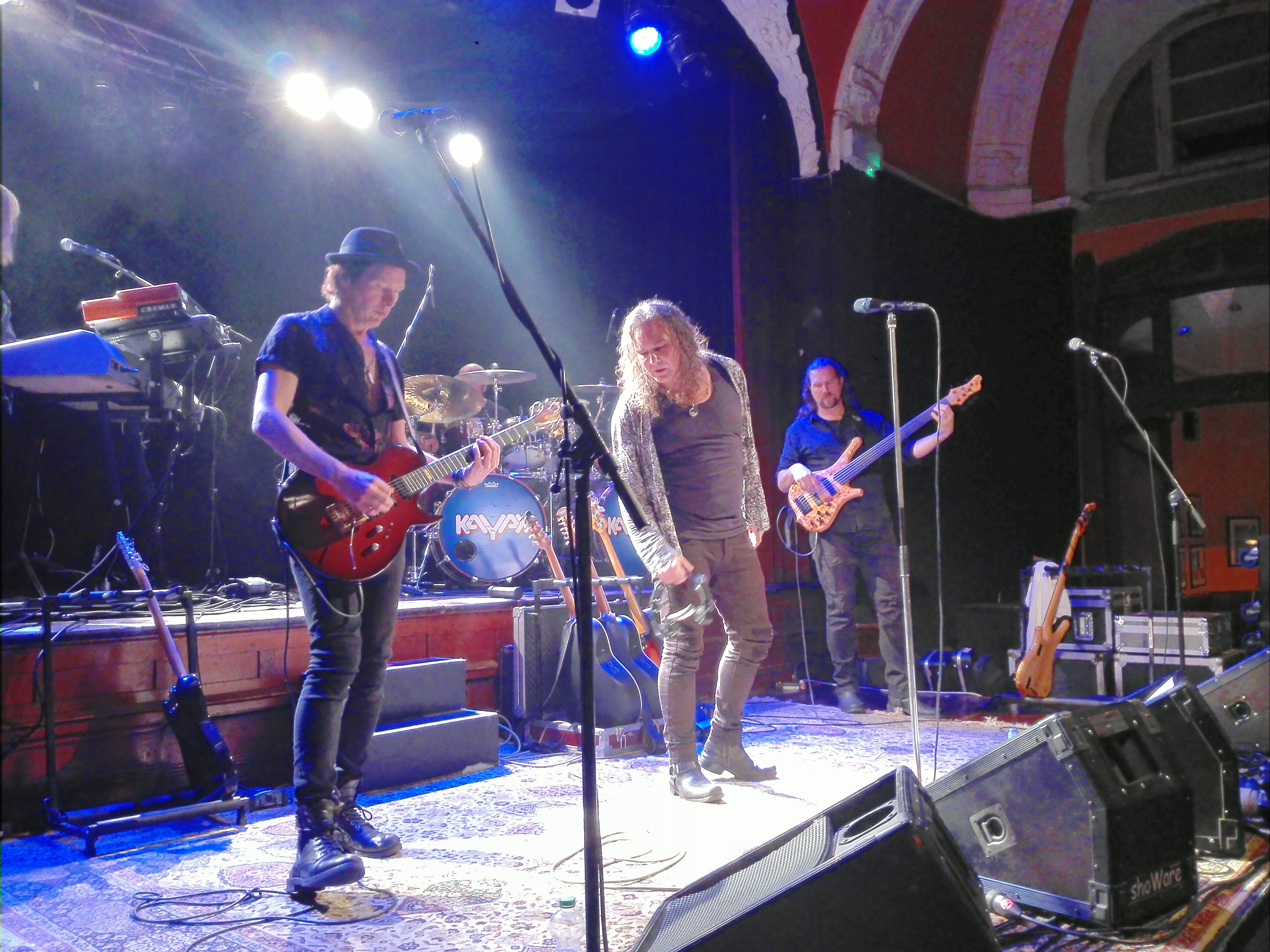 Kayak (2018), Live in Dortmund mit Marcel Singor (gitaar), Bart Schwertman (zang/sang) und Kristoffer Gildenlöw (bass)